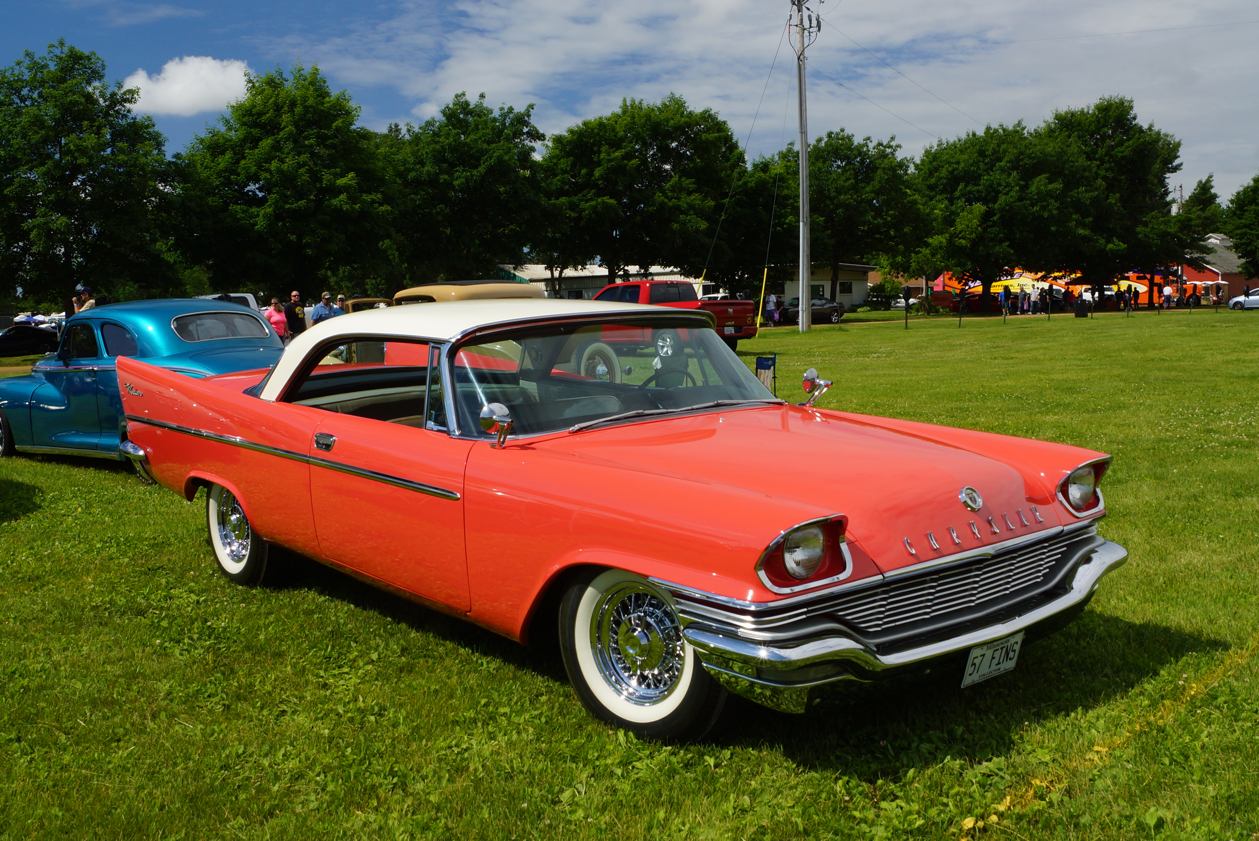 1957 Chrysler Windsor